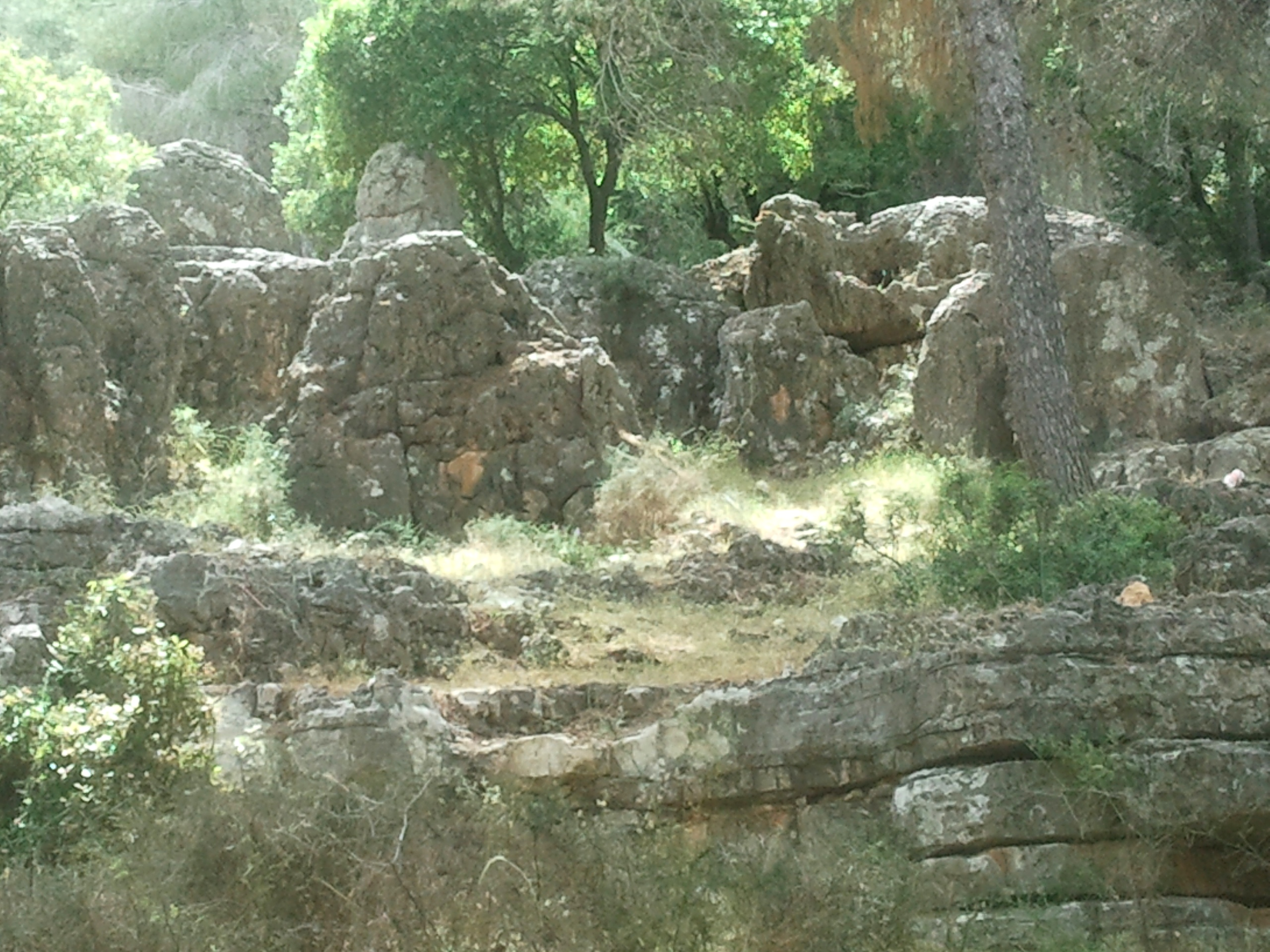 שביל טרשים באורך של 700 מטר העובר ליד תל גובל